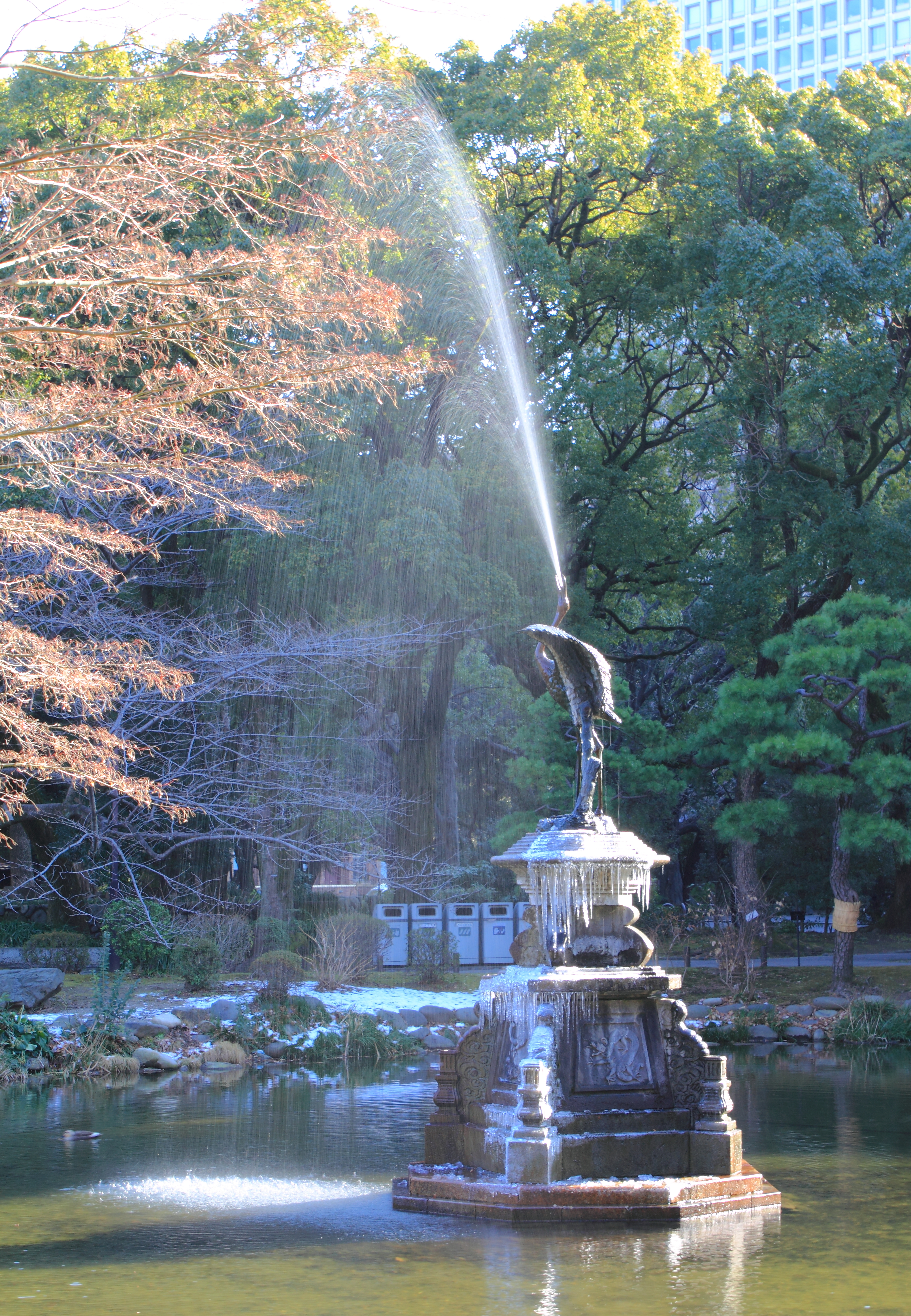 雲形池と鶴の噴水(日比谷公園)